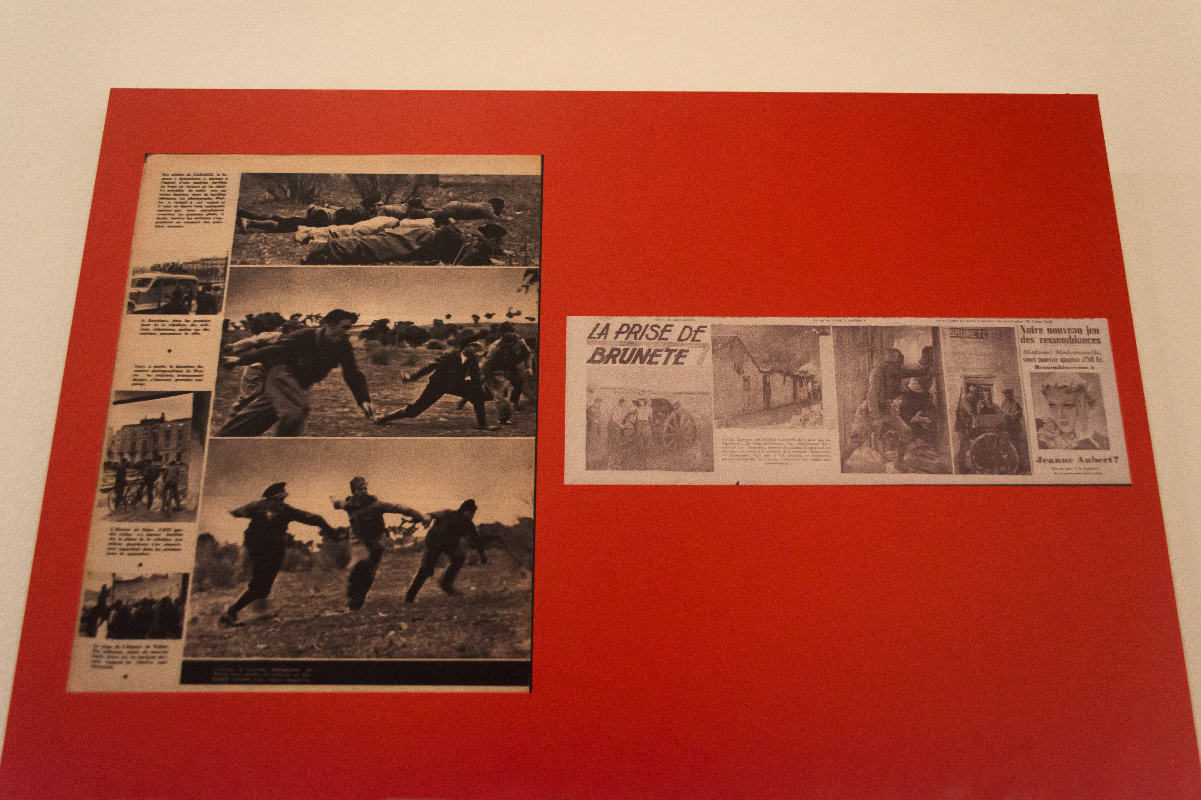 Noticias sobre la batalla de Brunete. Exposición Por la defensa de la Cultura en el Centro del Carmen de Valencia.